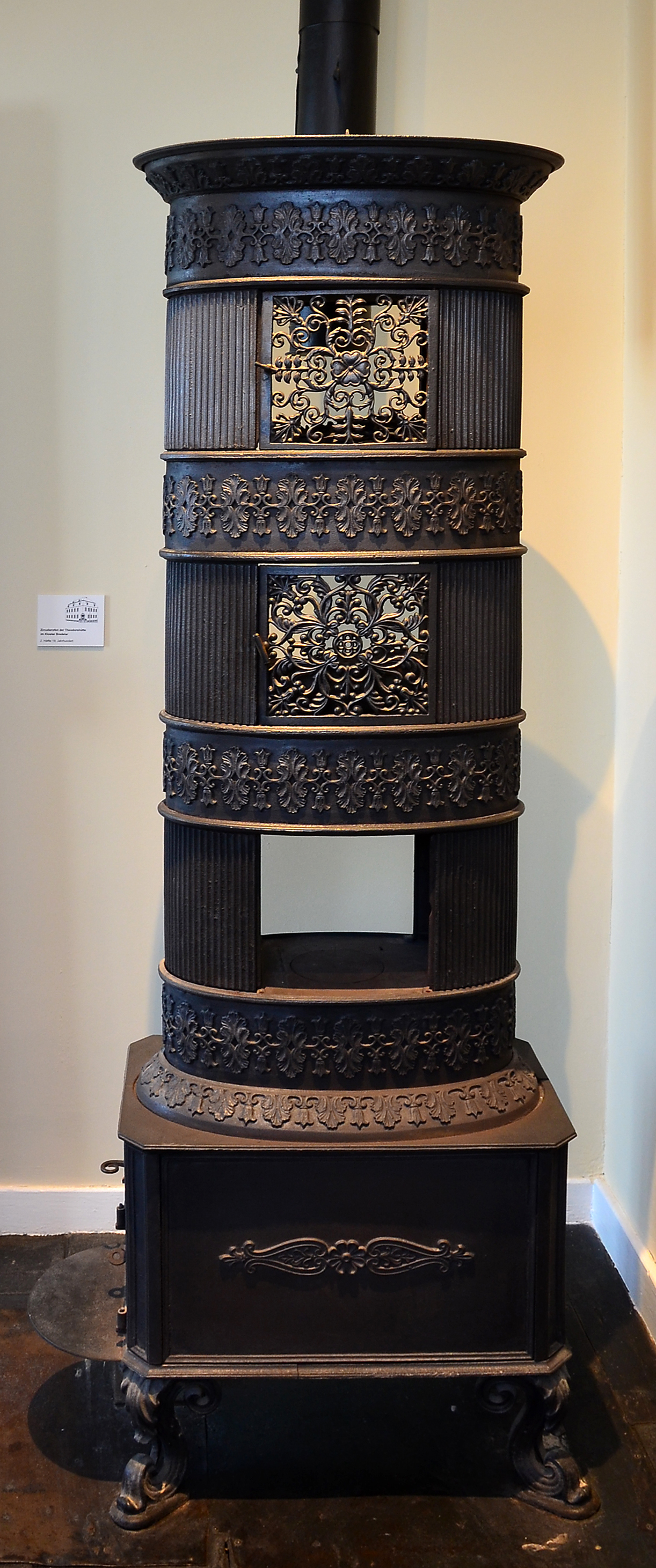 Museum Haus Hövener, Zirkulierofen der Theodorshütte Bredelar, 2.Hälfte 19.Jahrhundert